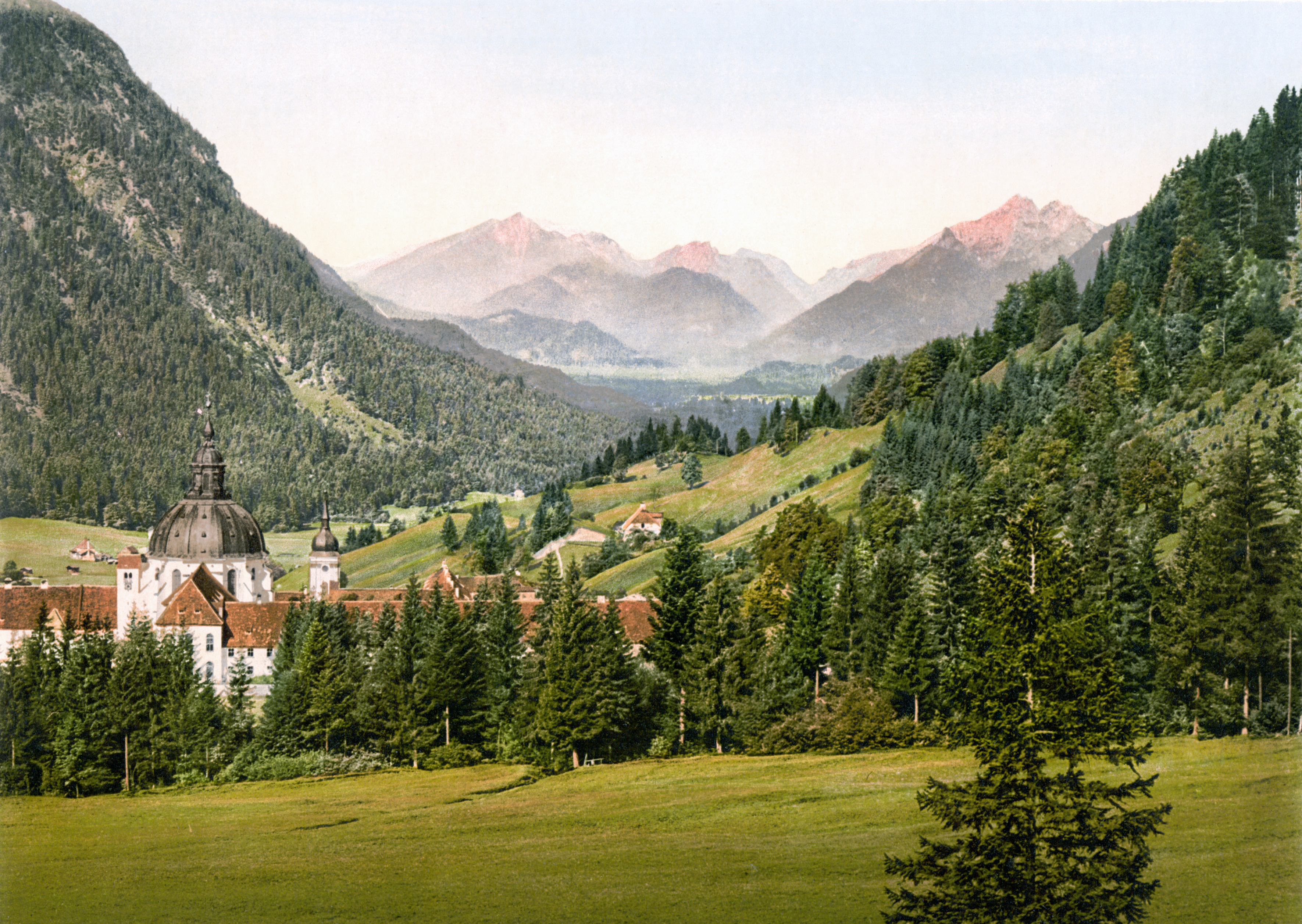 Ettal mit Ammergebirge um 1900